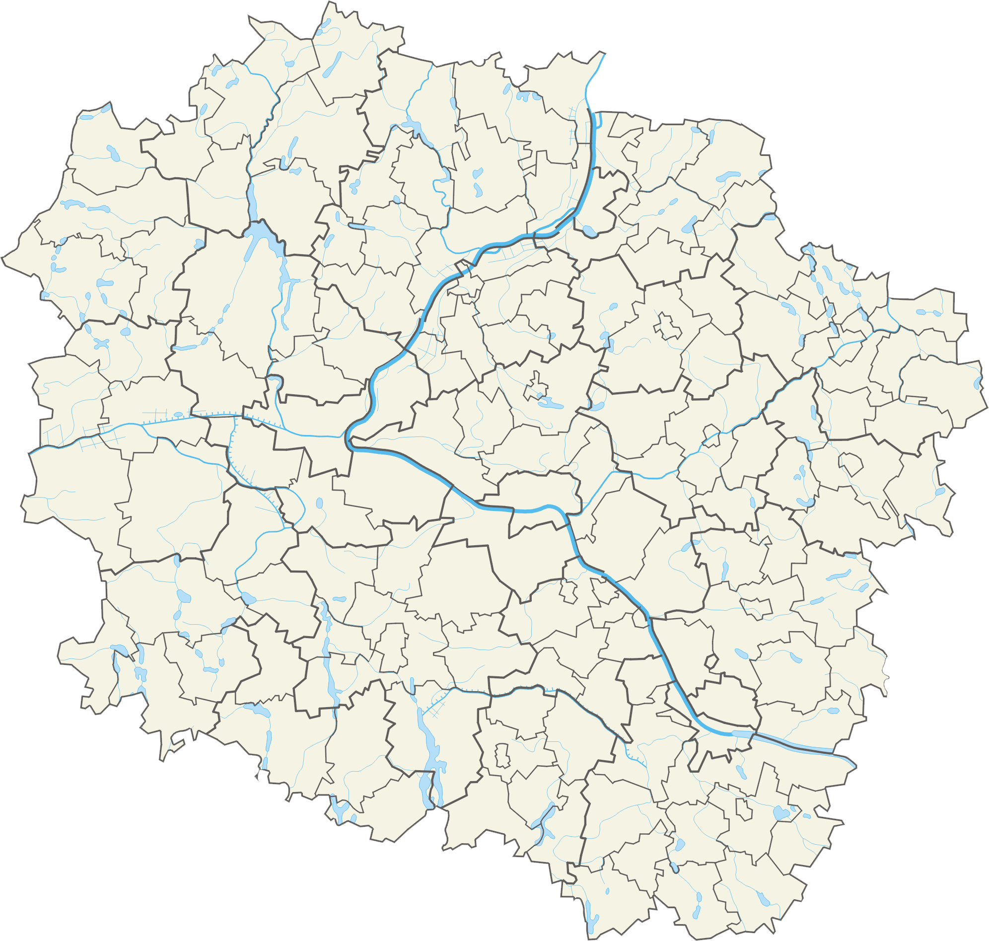 Województwo kujawsko-pomorskie – powiaty i gminy Współrzędne graniczne mapy: N: 53.7809° N S: 52.3306° N W: 17.2471° E E: 19.7617° E